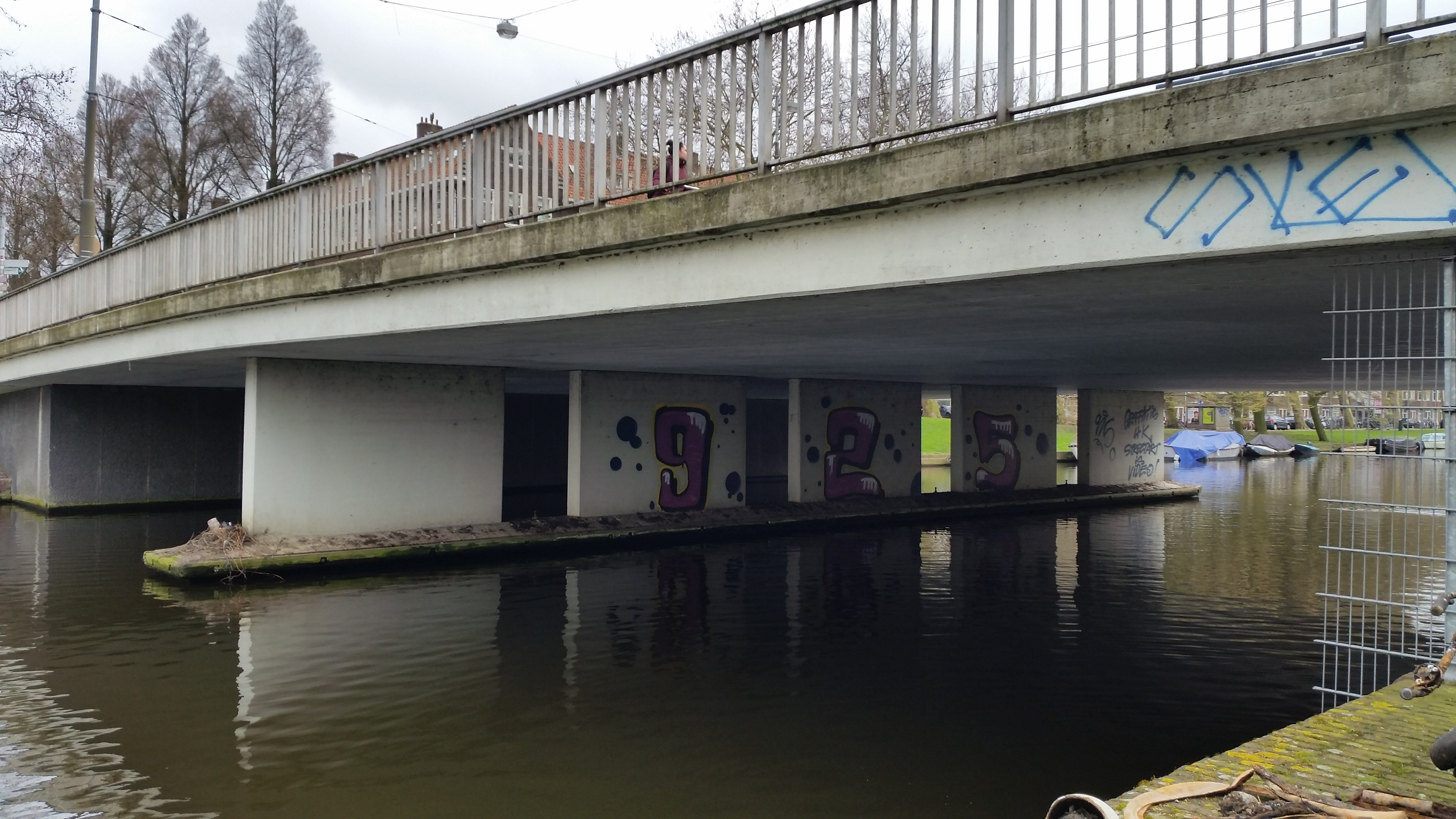 Overspanning en pijlers van Brug 385 (in Amsterdam)